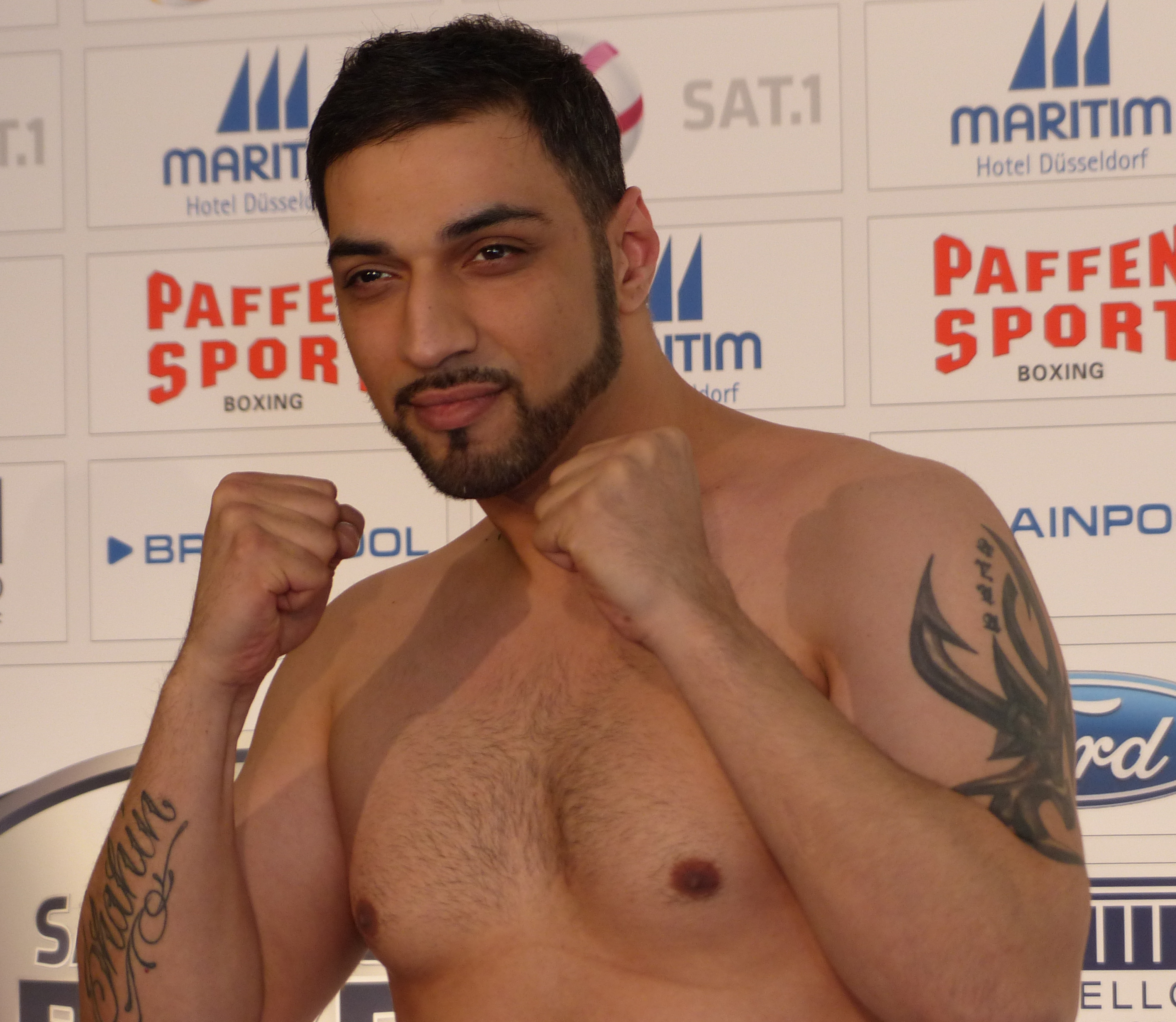 Mehrzad Marashi beim offiziellen Wiegen fürs Promiboxen 2013